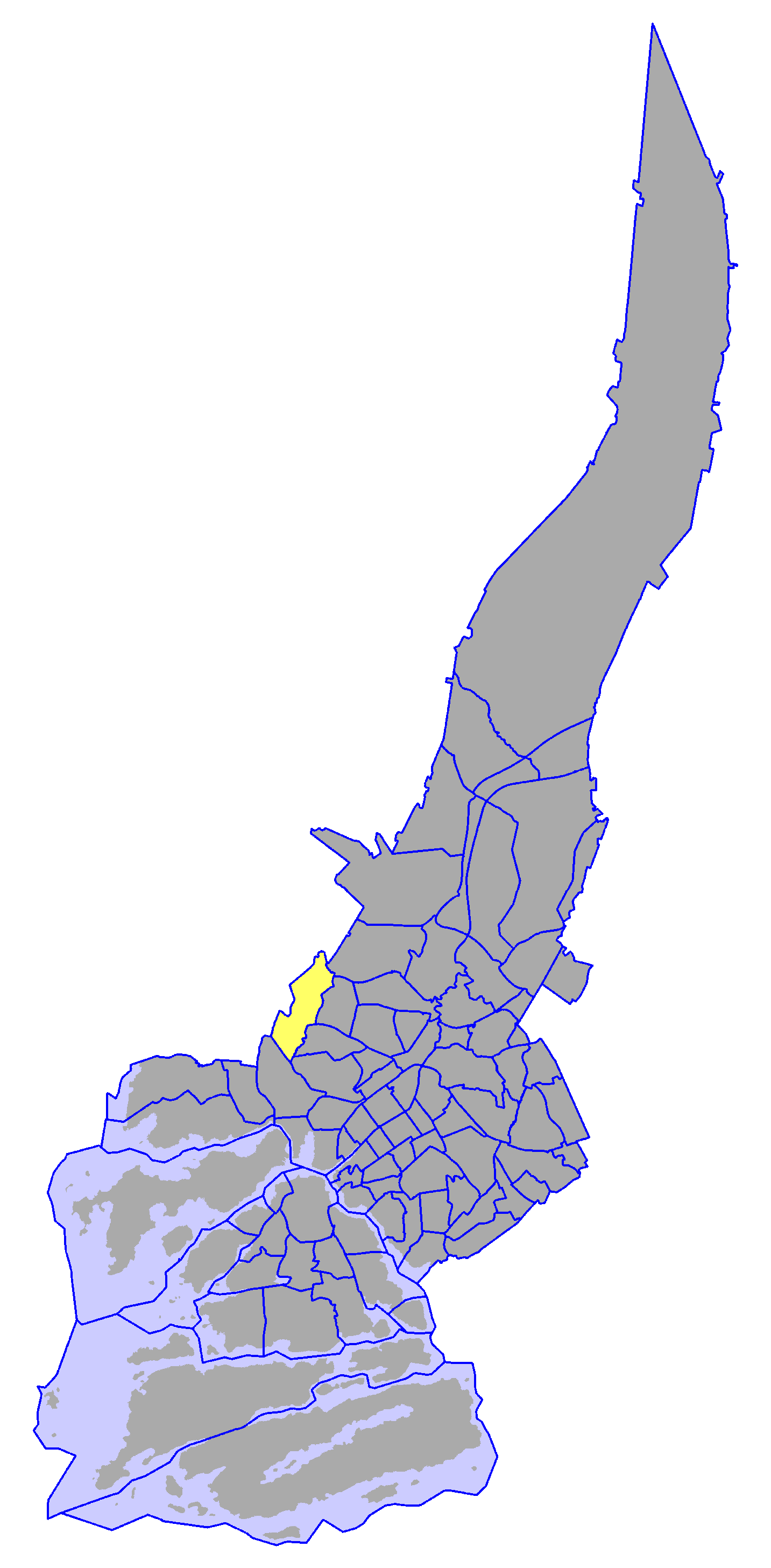 District of Mälikkälä, in Turku